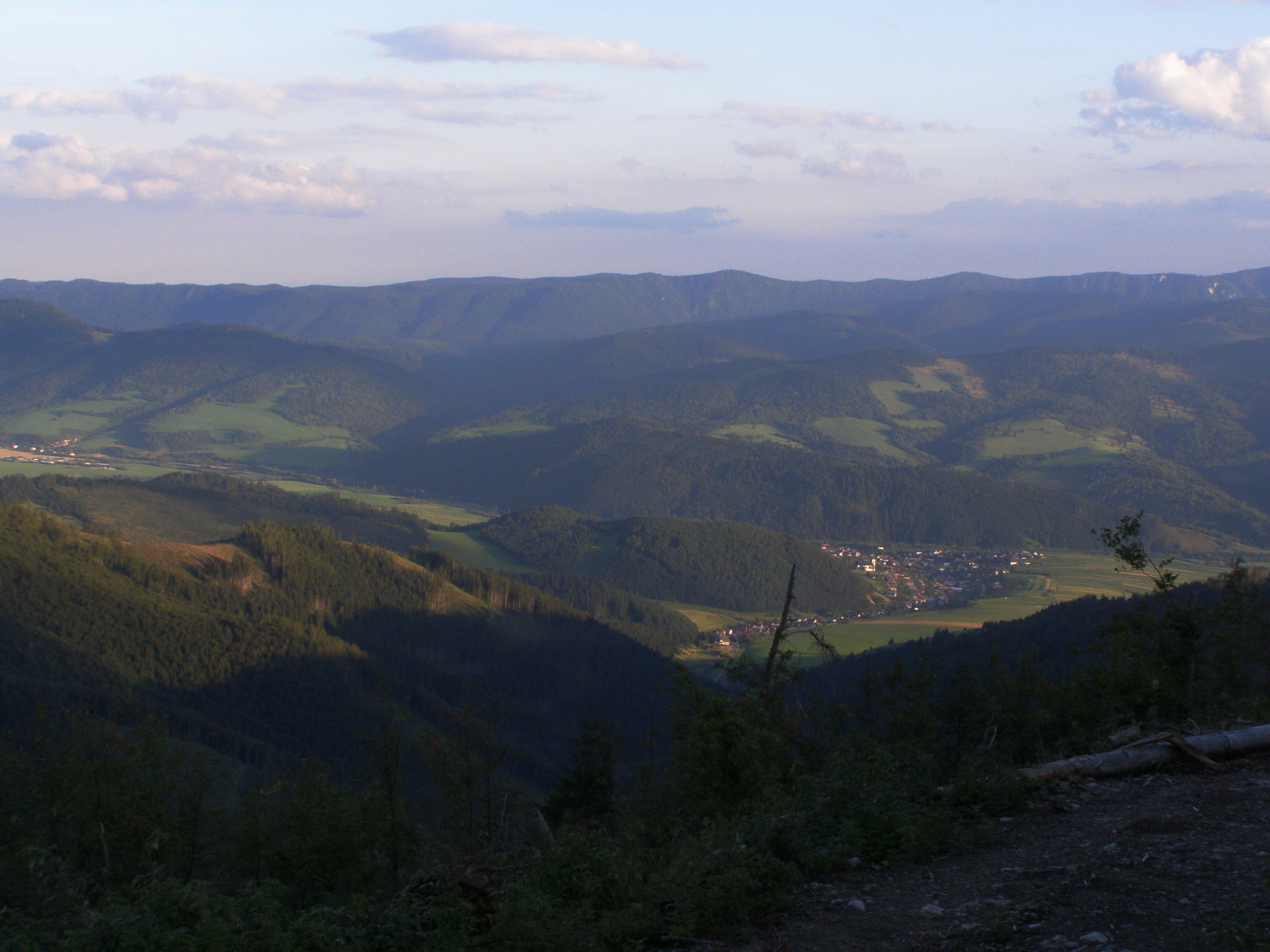 Nízké Tatry, Kráľovohoľské Tatry, pohled z východního úbočí vrcholu Kolesárová (1508 m) na jihovýchod: Horehronské podolie (obec Heľpa), v pozadí Slovenské rudohoří (Muráňská planina)